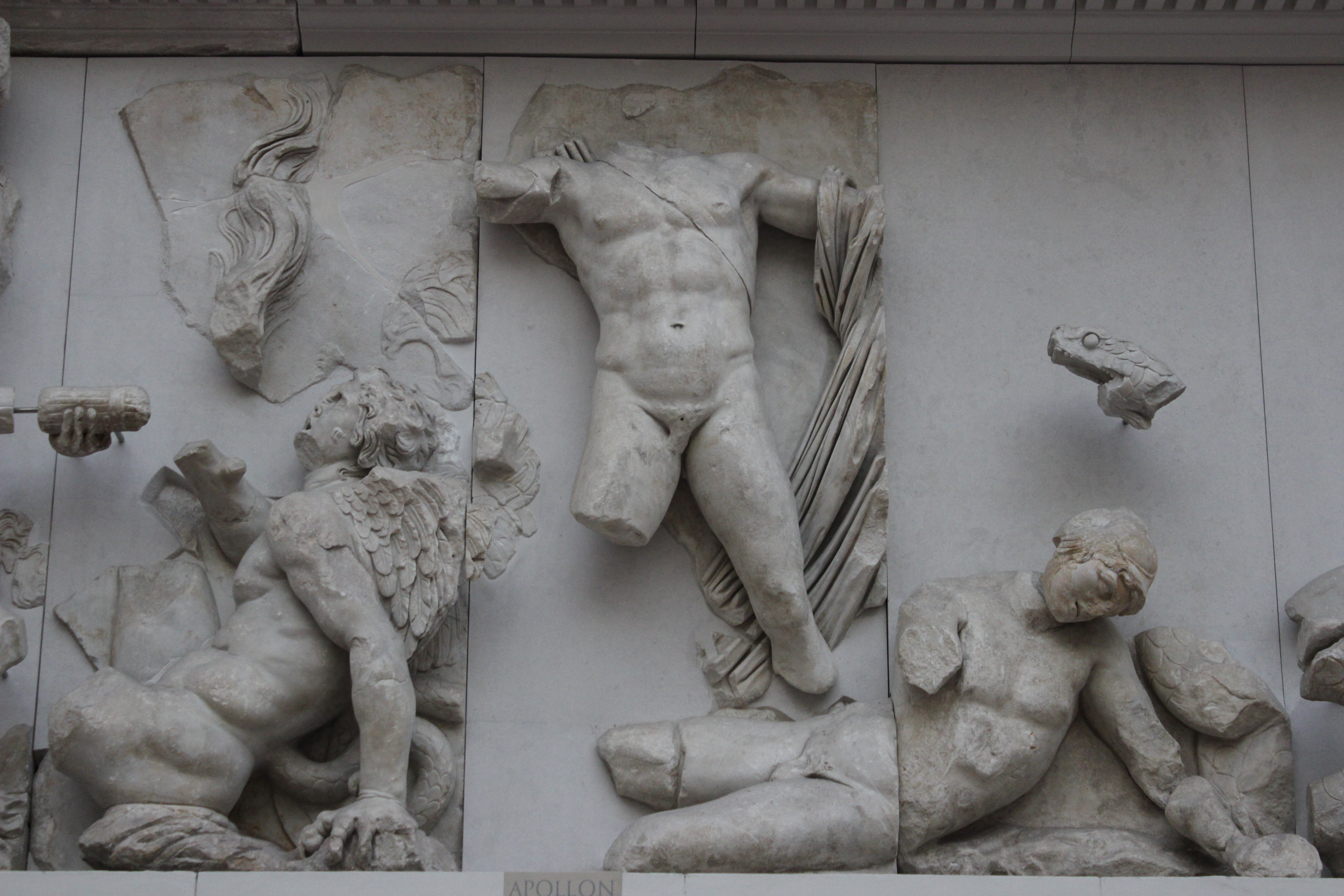 Apolo lucha con los gigantes. Altar de Pérgamo.